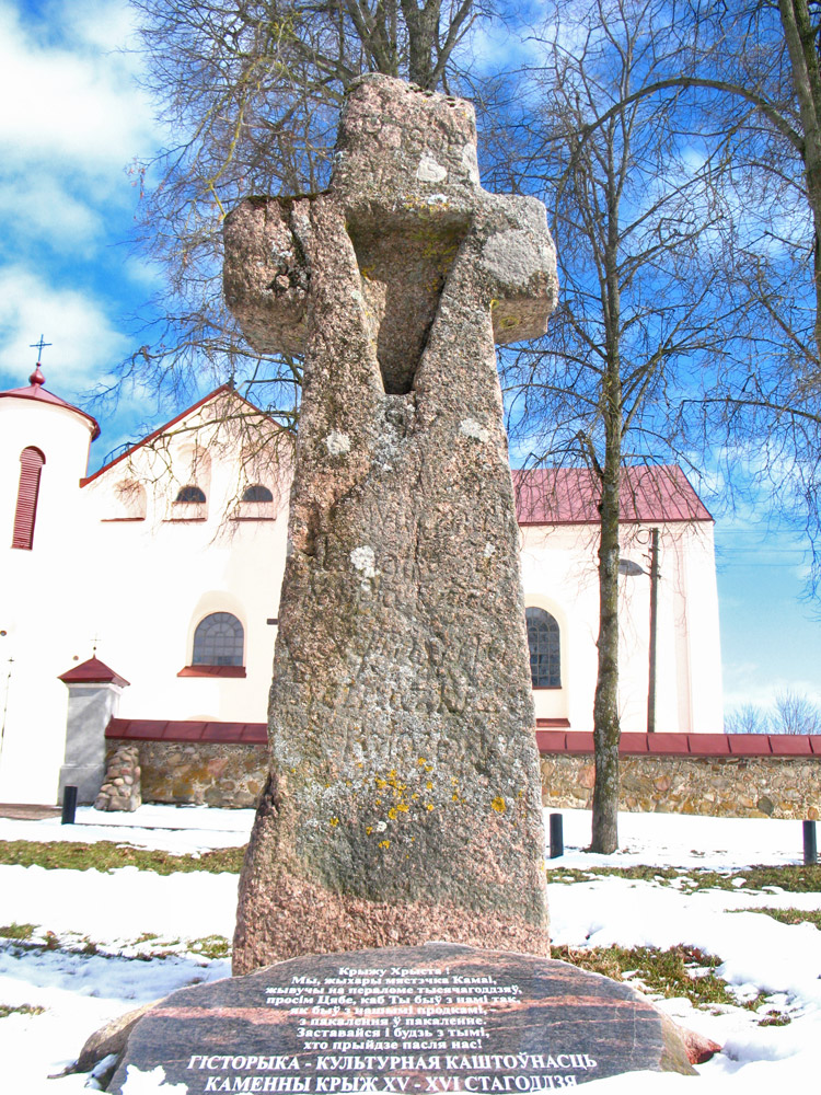 Беларуская (тарашкевіца): Камаі, каменны крыж